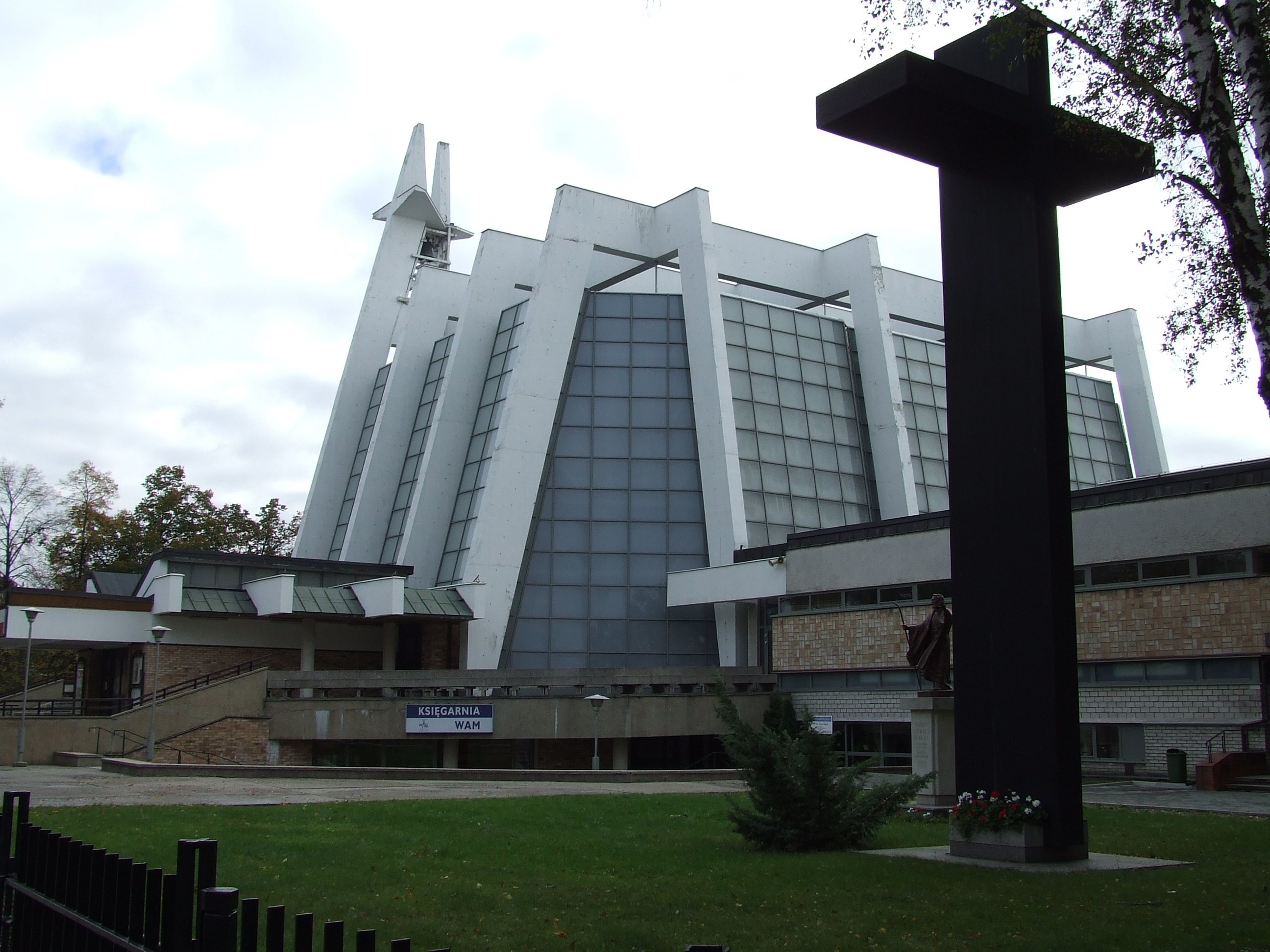 Sanktuarium św. Andrzeja Boboli w Warszawie